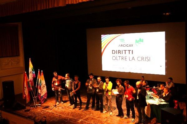 La dirigenza nazionale di Arcigay eletta al XIV Congresso, presidente, segretario e segreteria